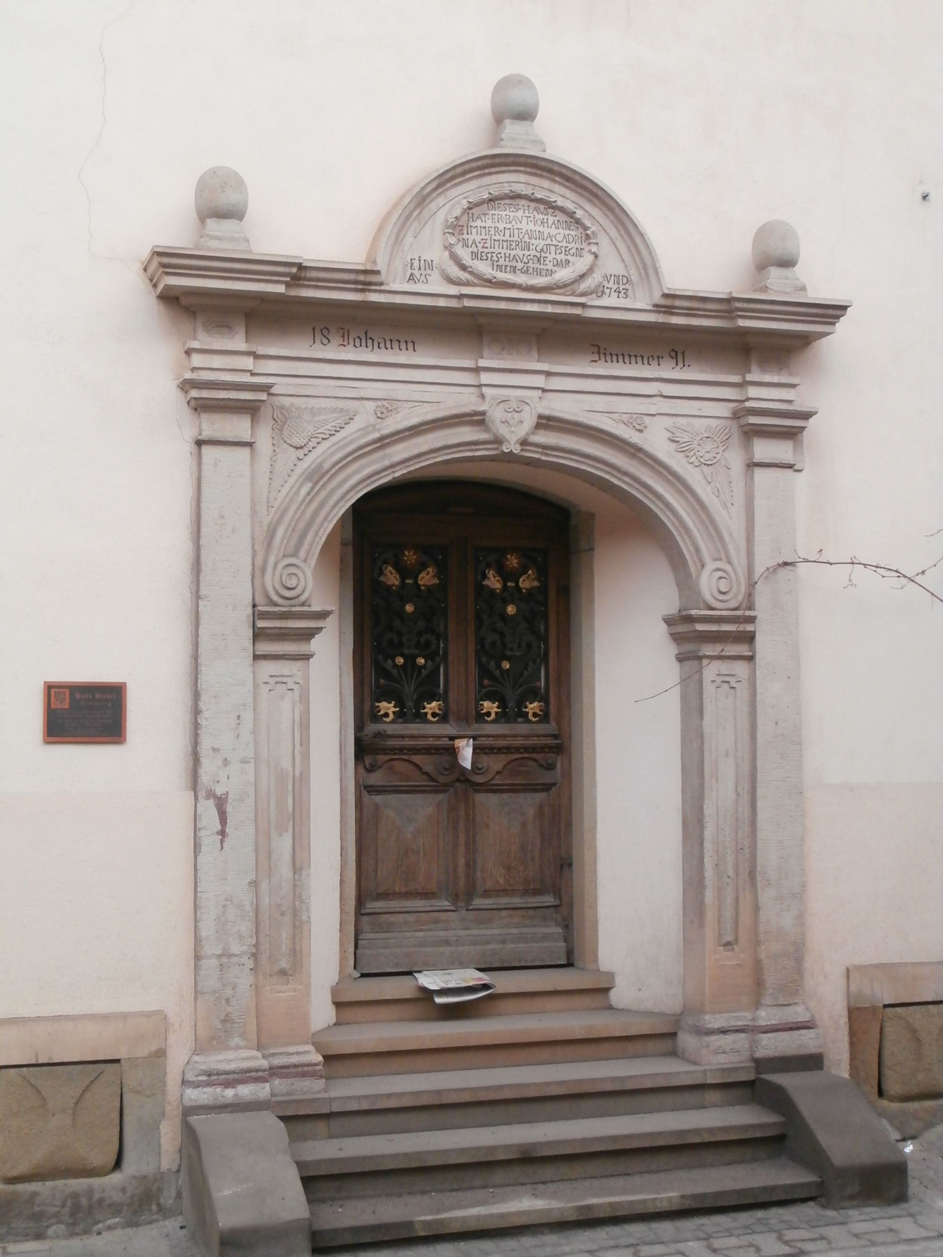 Kulturdenkmal in Flonheim/Rheinland-Pfalz.